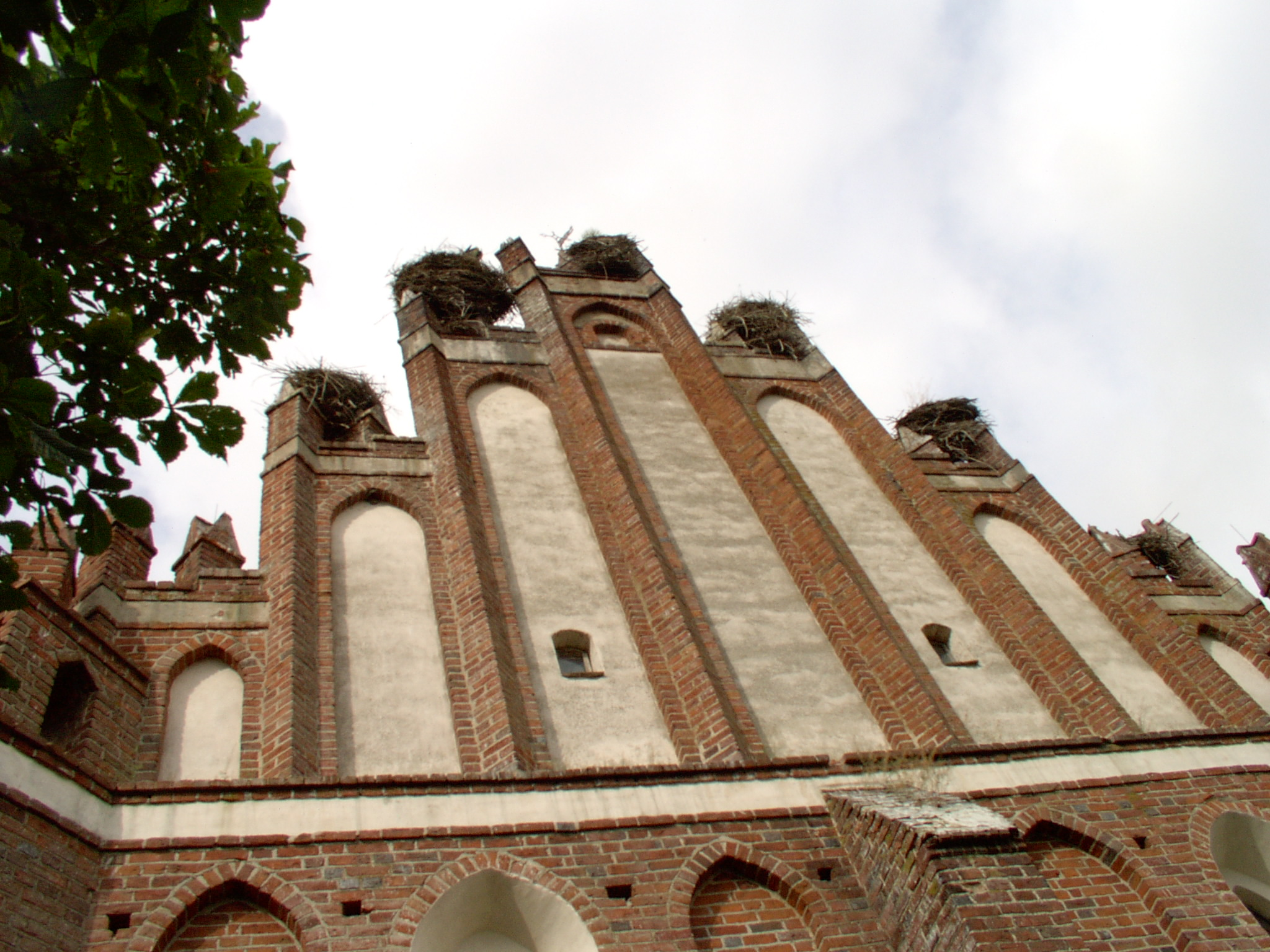 Kosciół we Lwowcu